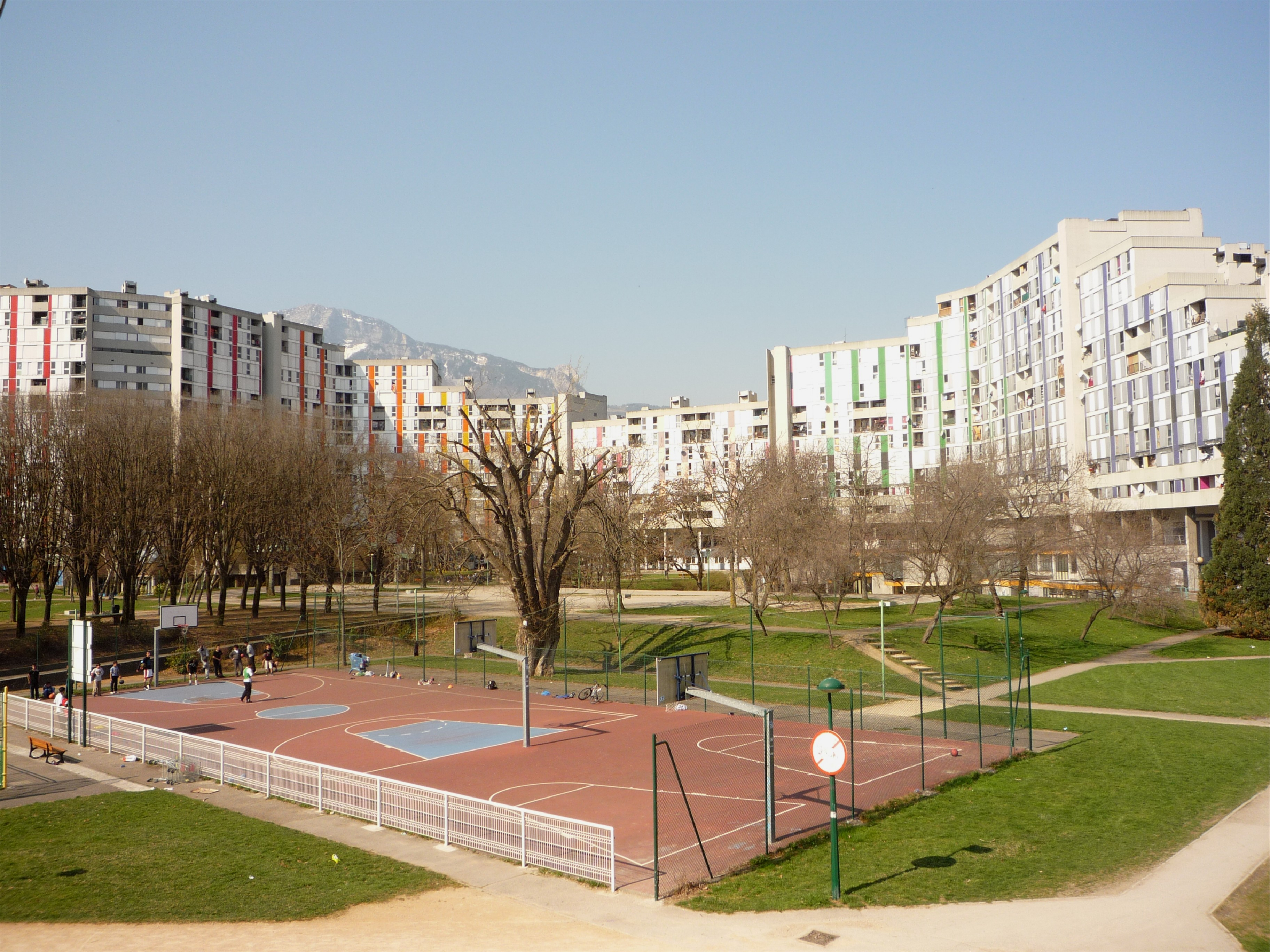 Galerie de l'Arlequin dans le parc Jean Verlhac de la Villeneuve de Grenoble. Site historique du stade d'ouverture des Xe jeux olympiques d'hiver le 6 février 1968.